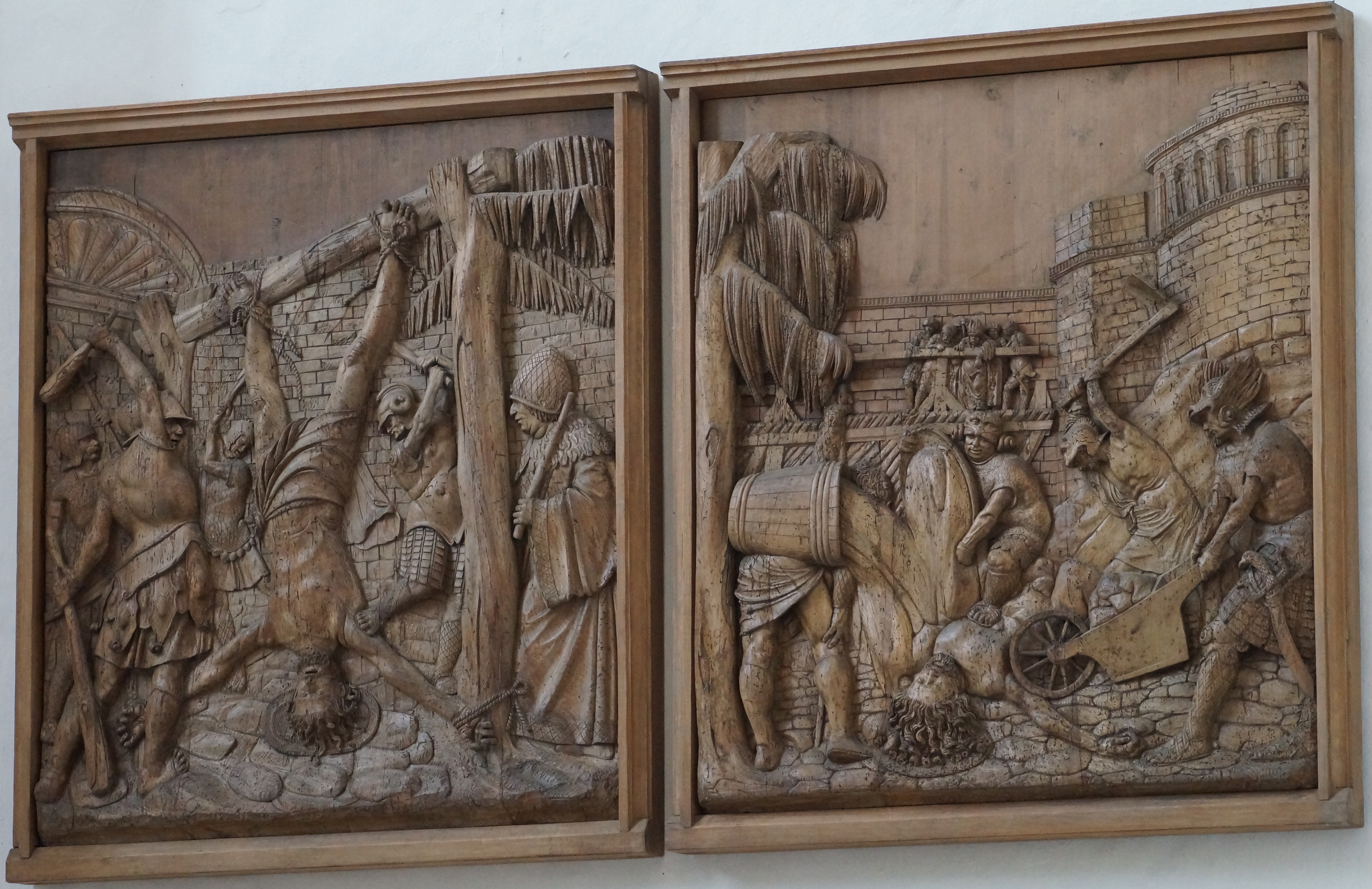 Altartafeln des Leinberger-Altars im Kastulusmünster von Moosburg an der Isar. Dargestellt ist das Martyrium des Heiligen Kastulus.